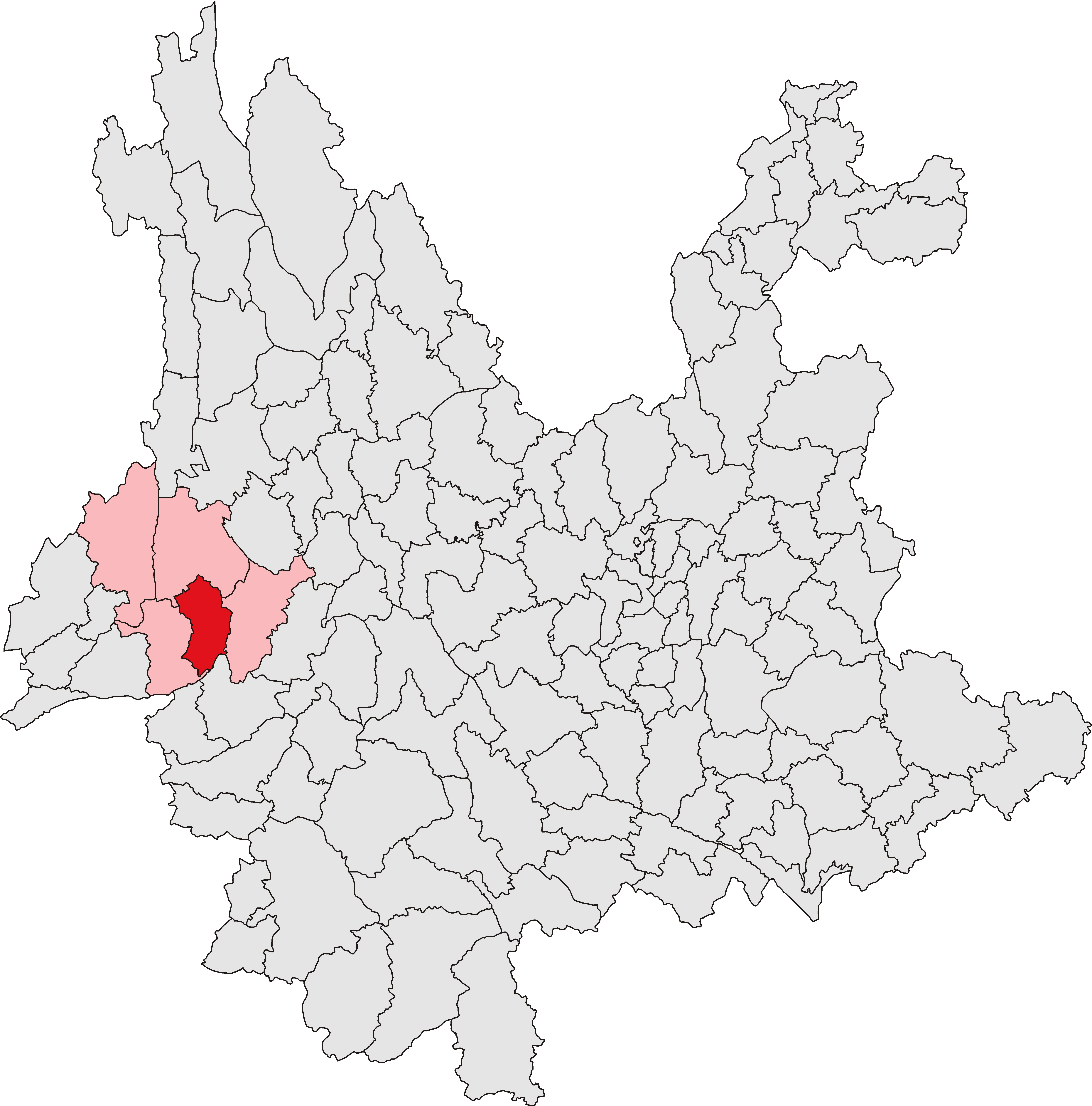 中文（中国大陆）: 施甸县位置图